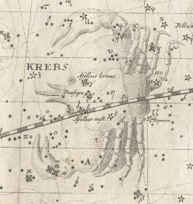 Sternbild Krebs, Stich von 1782